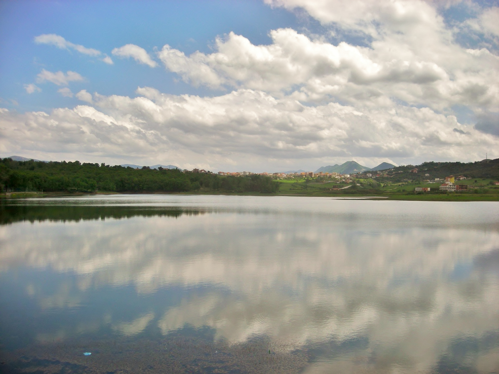 Tirana.